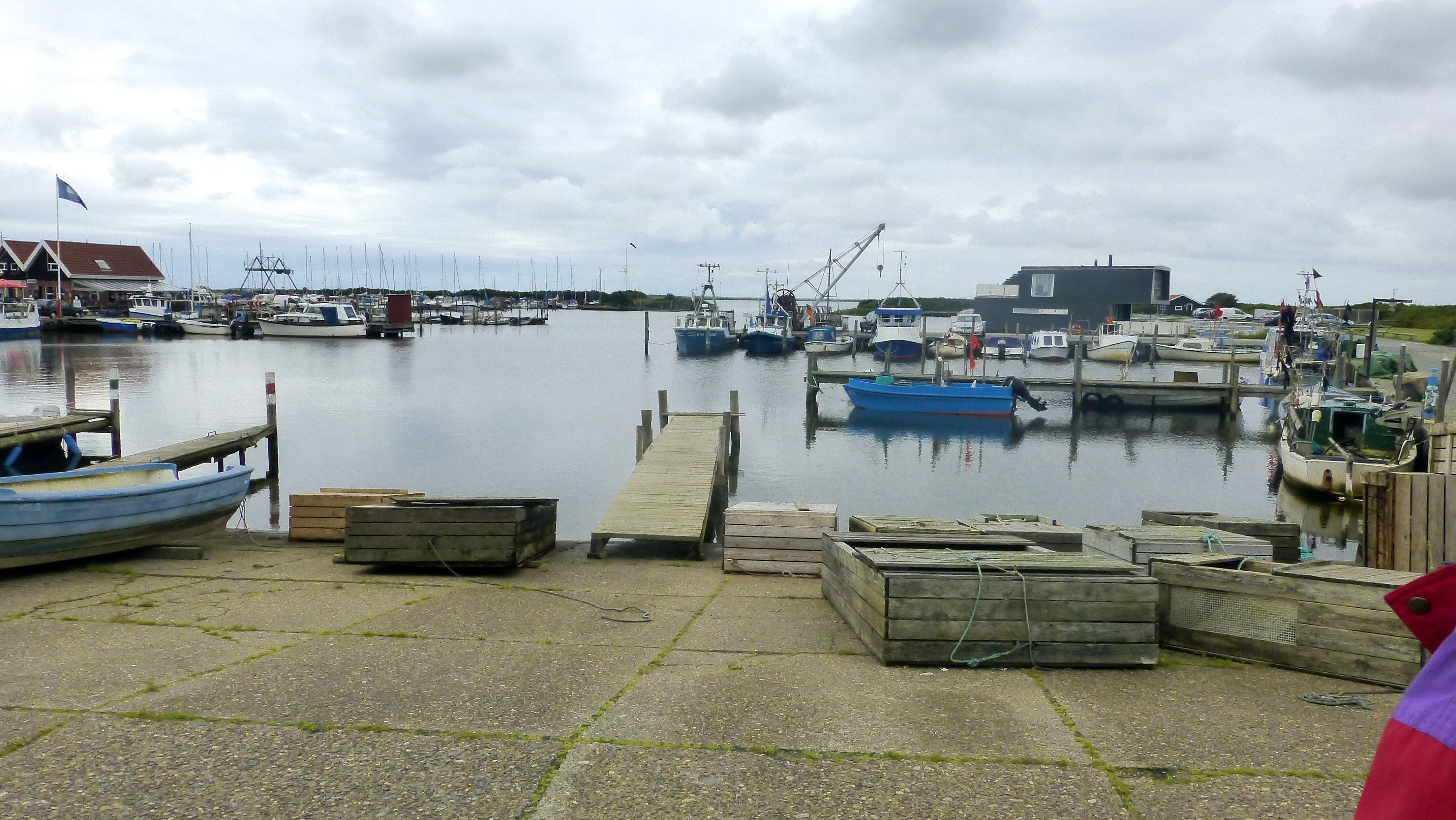 Bork Havn set mod nordvest